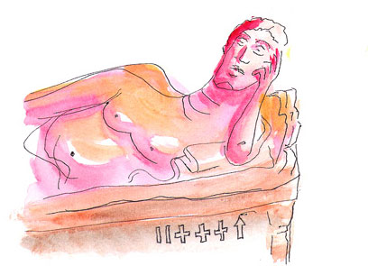 Profil d'un banqueteur (dit « Obeso ») du symposium, sur le couvercle d'un sarcophage figuré du musée de Tarquinia